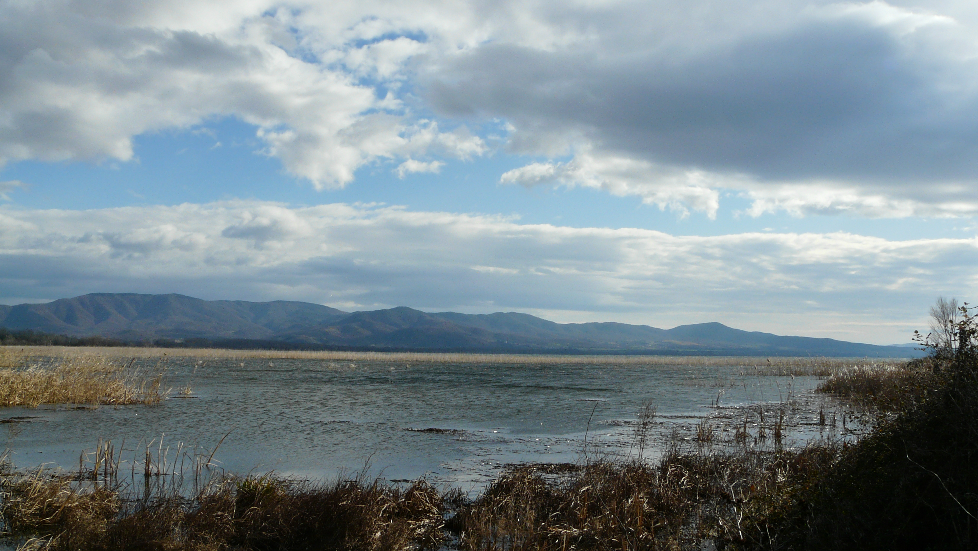 Lake Dojran, Macedonia